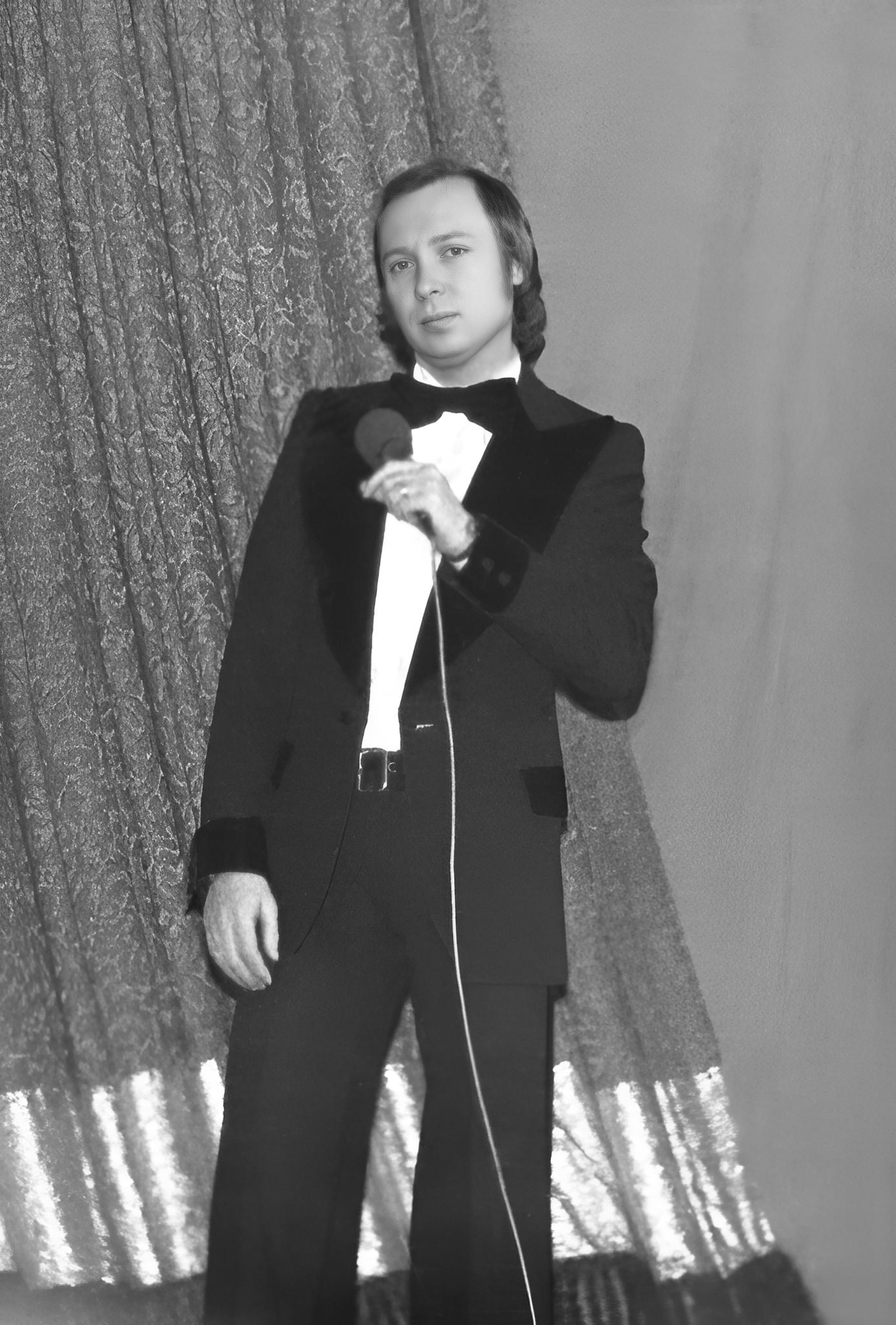 Ободзинский Валерий Владимирович, советский и российский певец, 1976 год